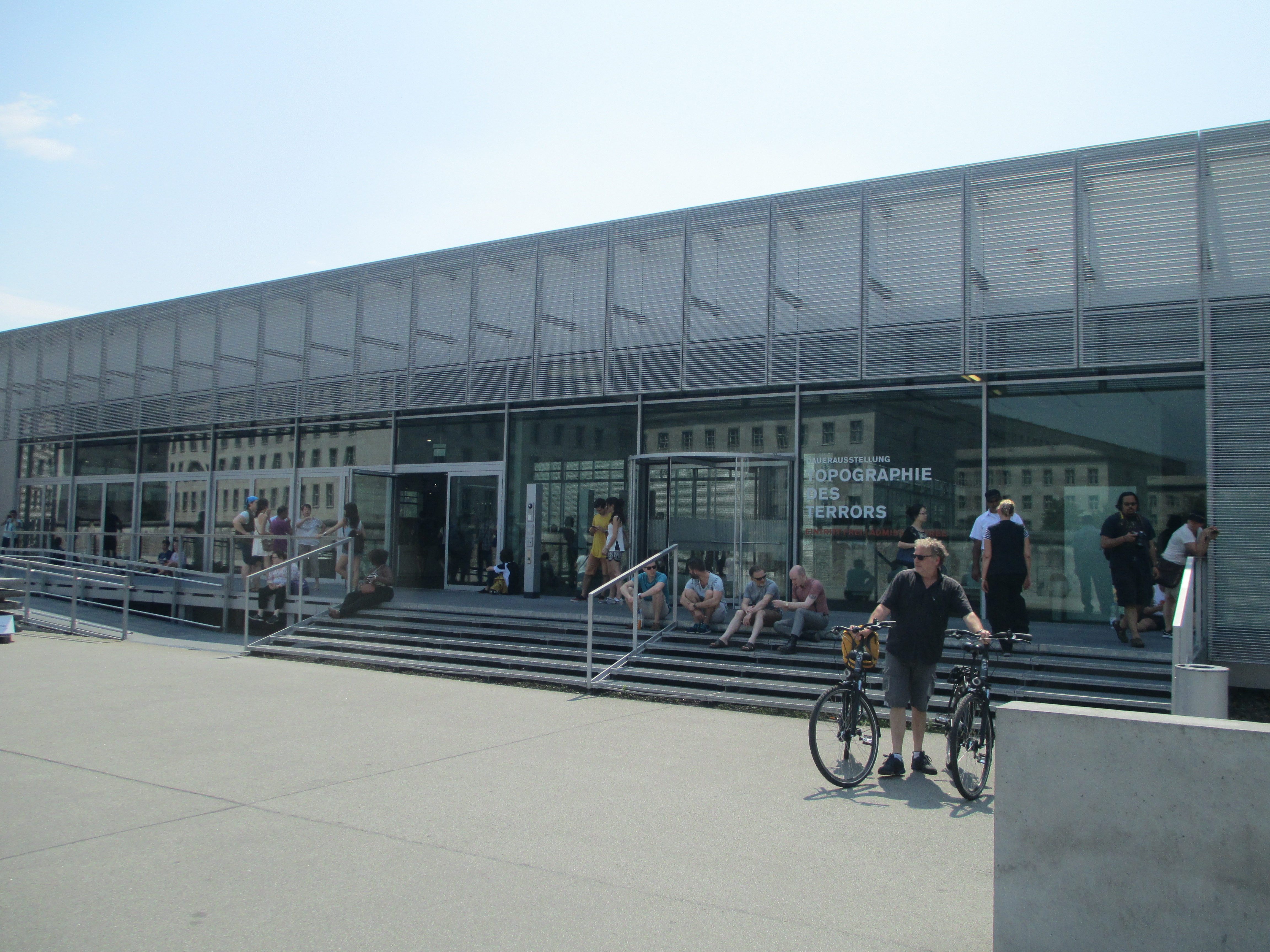 מוזיאון הטופוגרפיה של הטרור בברלין